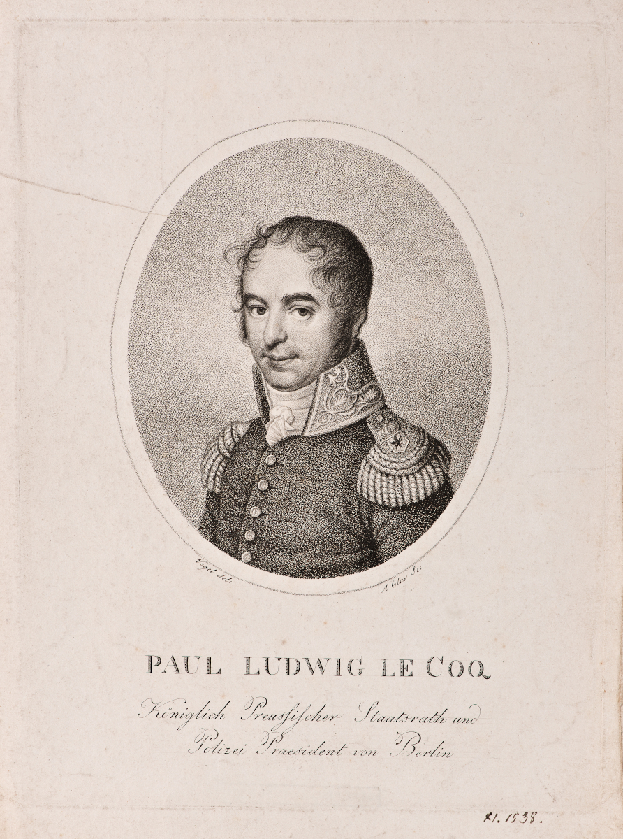 Bildnis des Paul Ludwig le Coq - Königlich Preußischer Staatsrat und Polizeipäsident von Berlin (1773-1824)